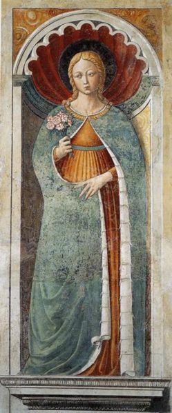 Saint Fina (Seraphina, Serafina); Apsidal Chapel of Sant' Agostino, San Gimignano, Italy.